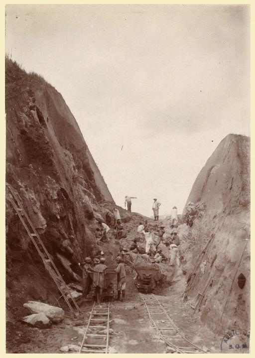 Lohariendava (Île de Madagascar). Les travaux en tranchée. Chemin de fer. Tournée d'Antsirabé du général Gallieni (1903)